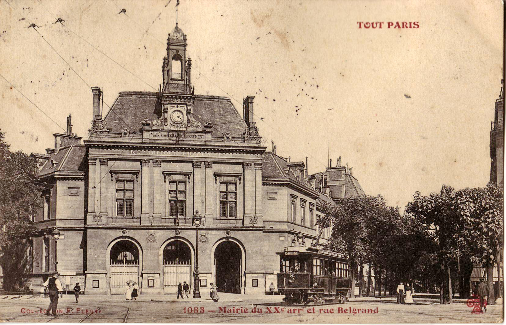 Carte postale ancienne éditée par F. Fleury - CCCC n°1083 Tout Paris - Mairie du XXe arrondissement et Rue Belgrand. Vue en plan moyen d'un tramway n°141 de l'Est Parisien pour l'Opéra